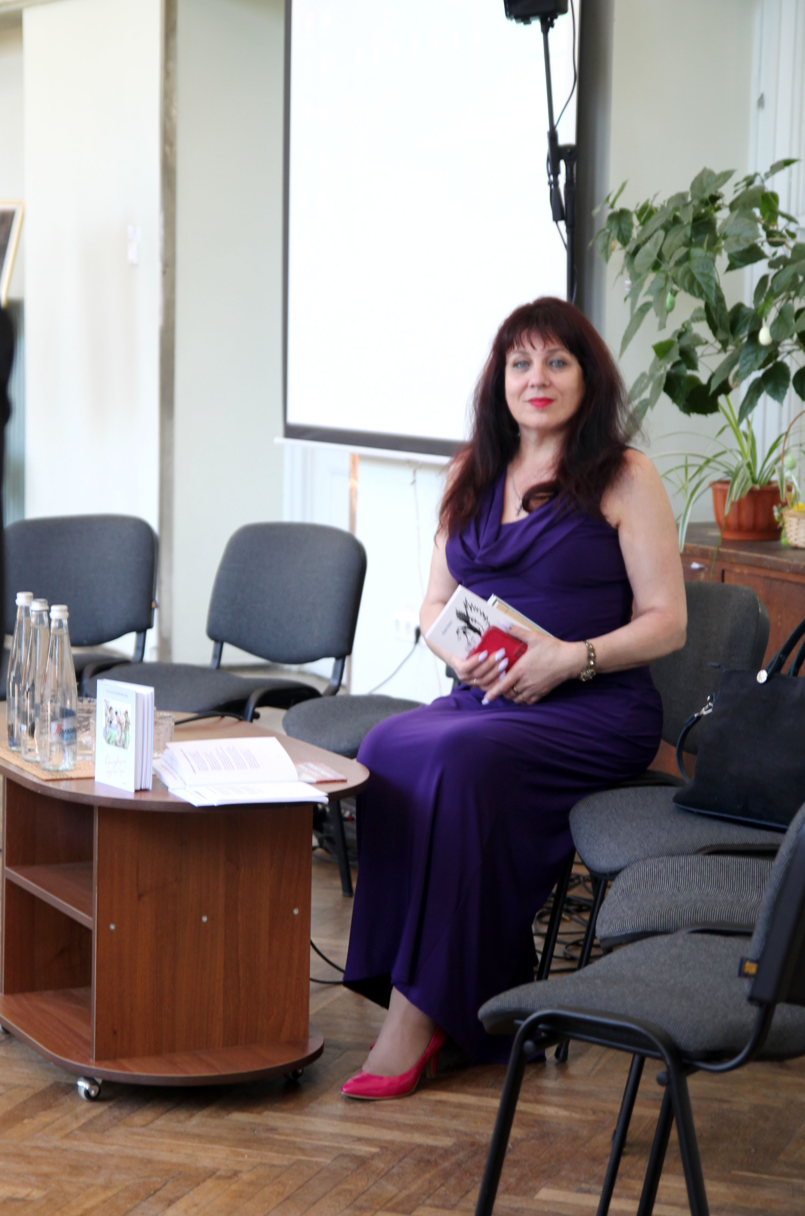 свято